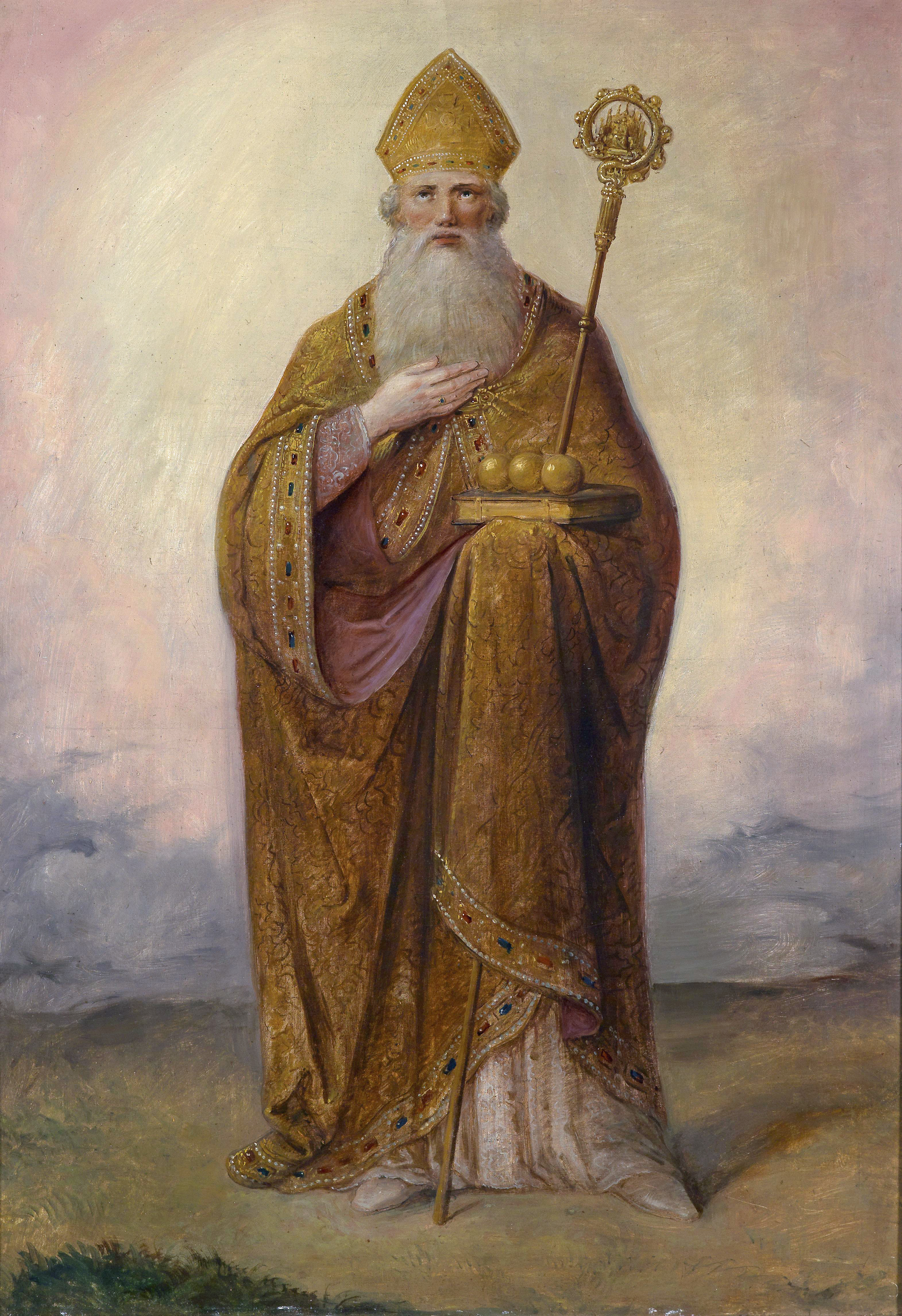 Der heilige Nikolaus, Öl auf Leinwand, 106 x 74 cm